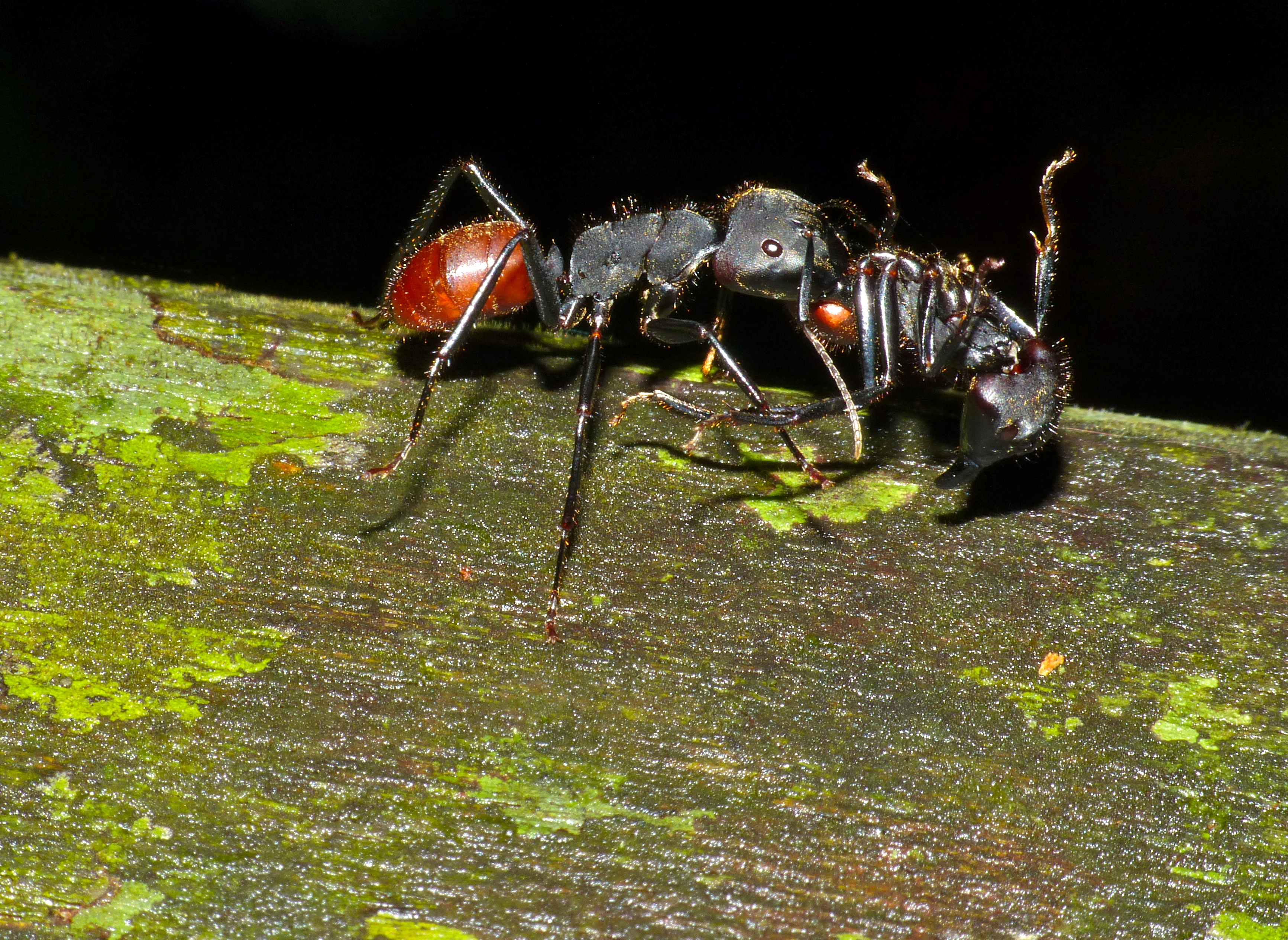 Deer Cave Boardwalk, Mulu NP, Sarawak, MALAYSIA